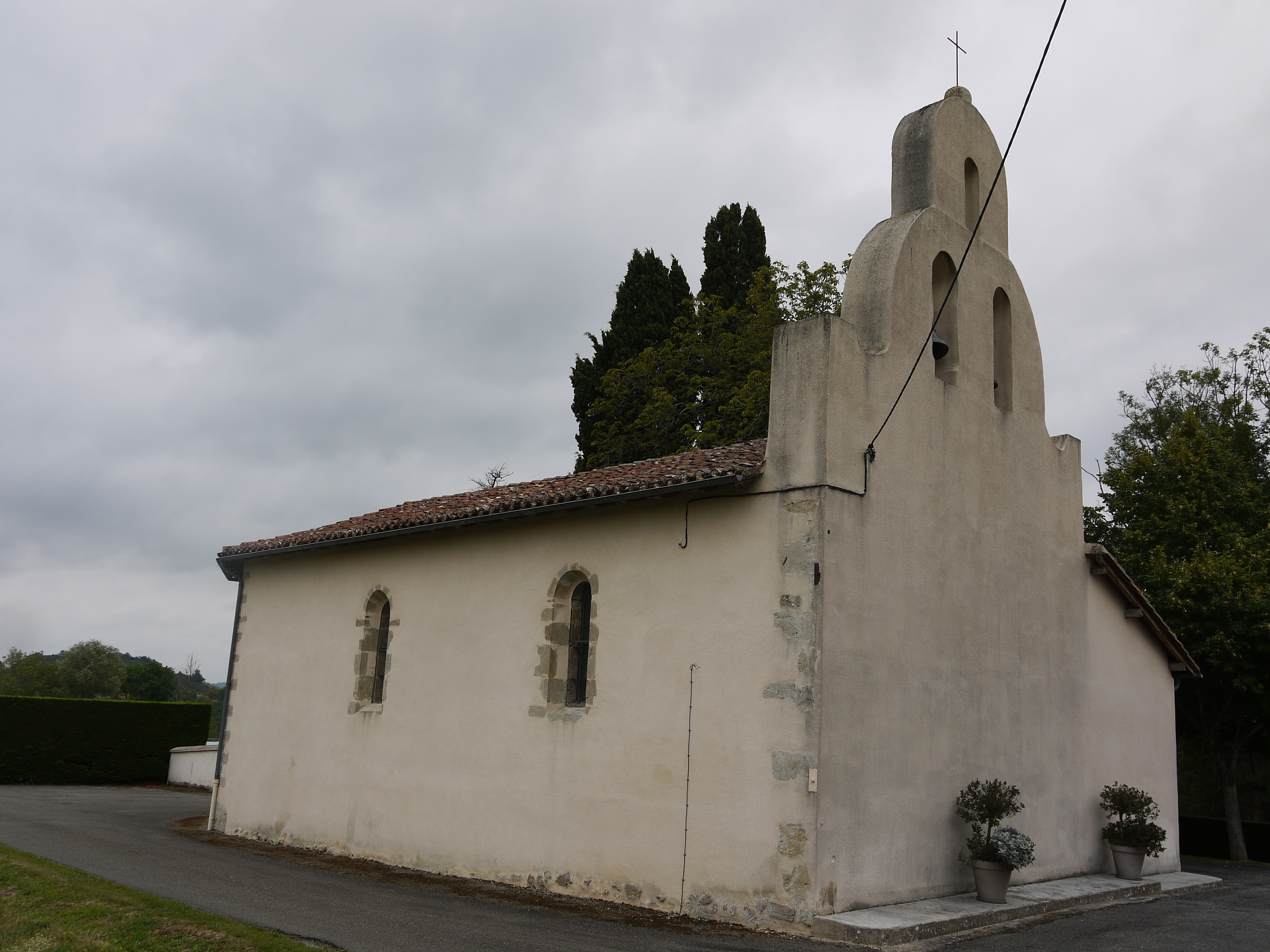 Vue depuis le nord-ouest de l'église Saint-Urbain de Sémézies